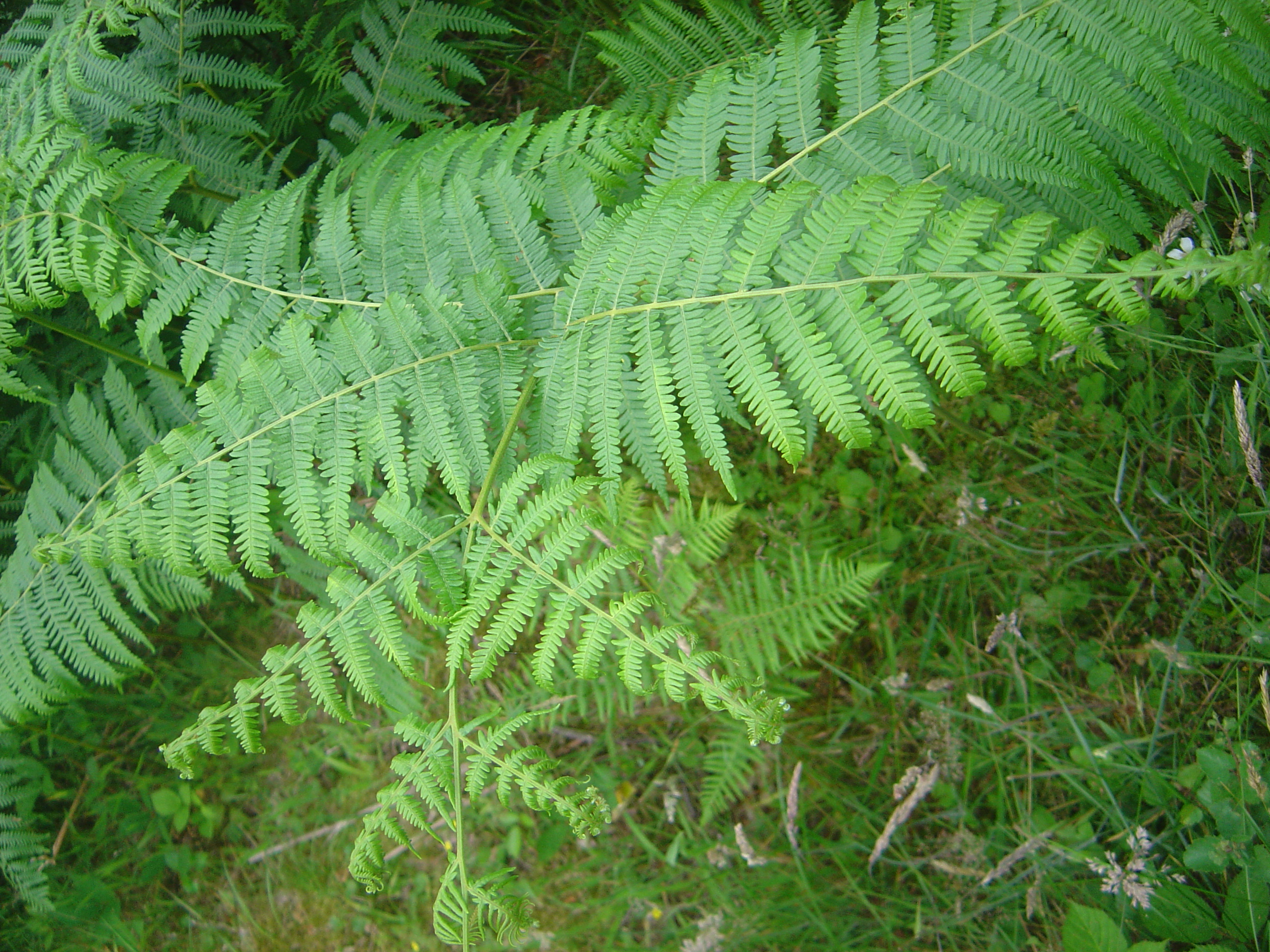 a fern: Pteridium aquilinum